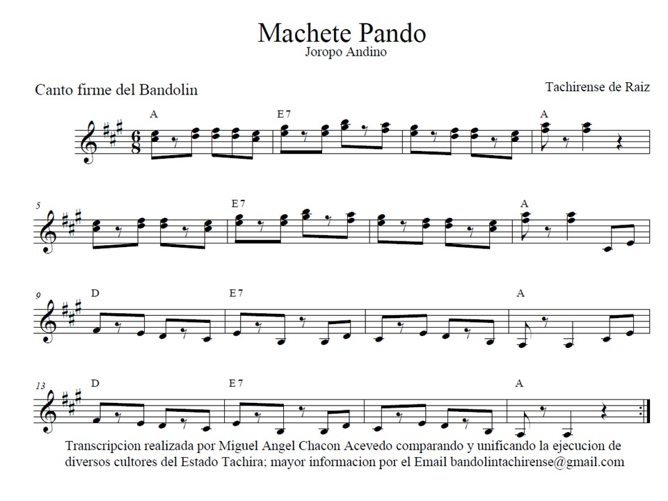 Machete Pando, transcripcion del Canto firme del Bandolin